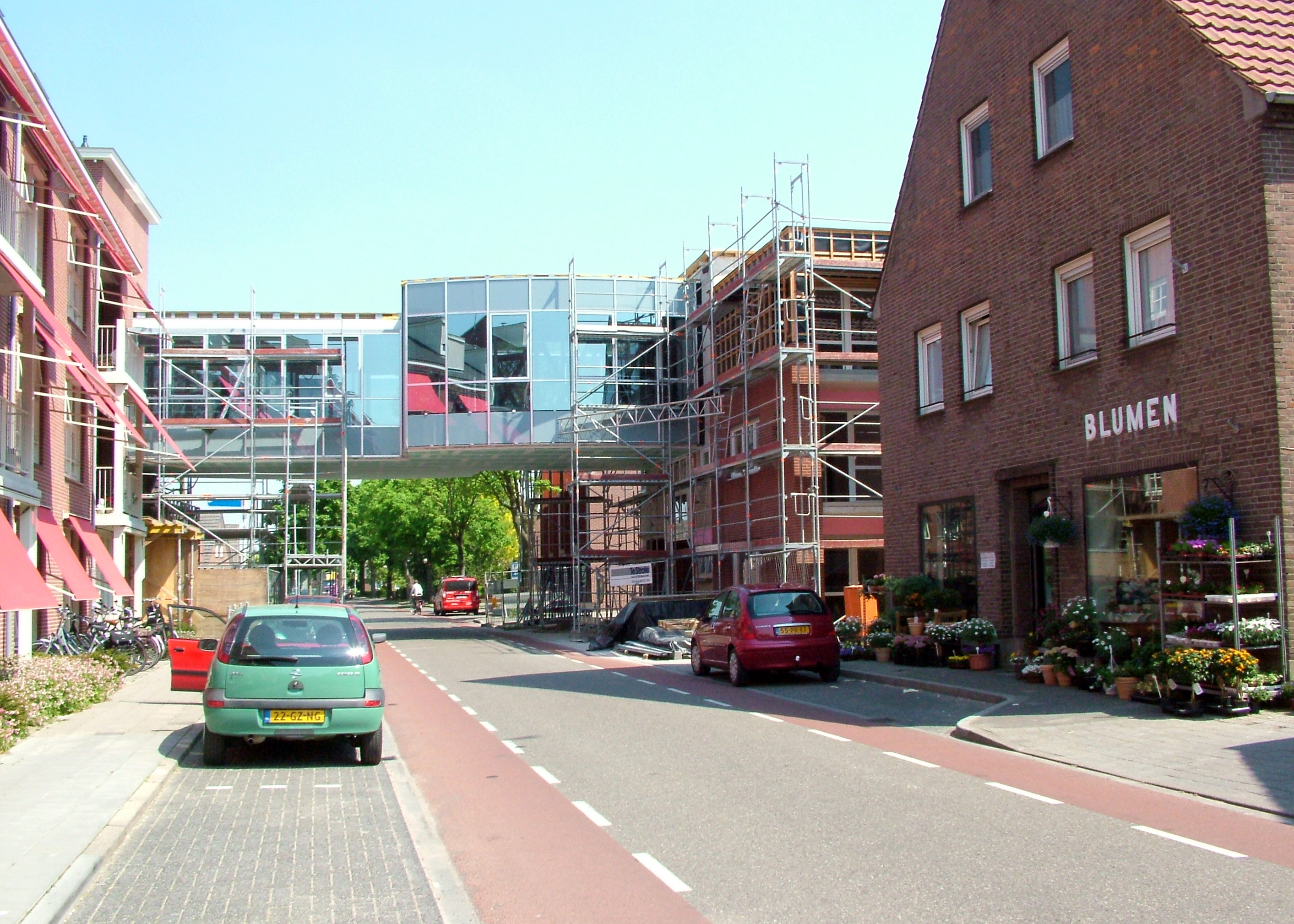 Heelweg in Dinxperlo (links), Hellweg in Suderwick (rechts). In het midden: grensoverspannende seniorenvoorziening in aanbouw